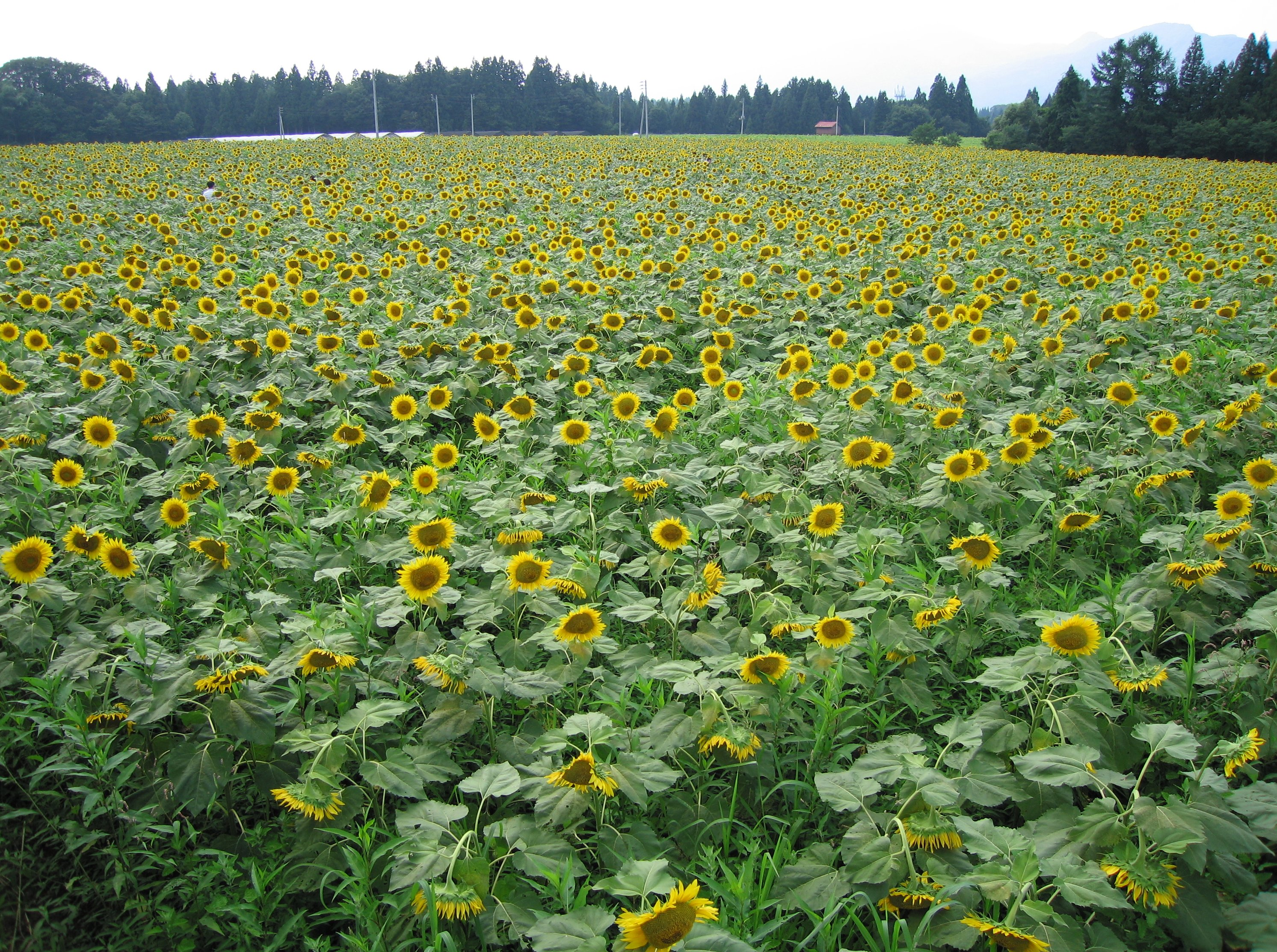 ひまわり畑,Tsunann-town,Niigata-pref,Japan.Aug,2005.